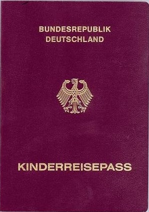 Deutscher Kinderreisepass